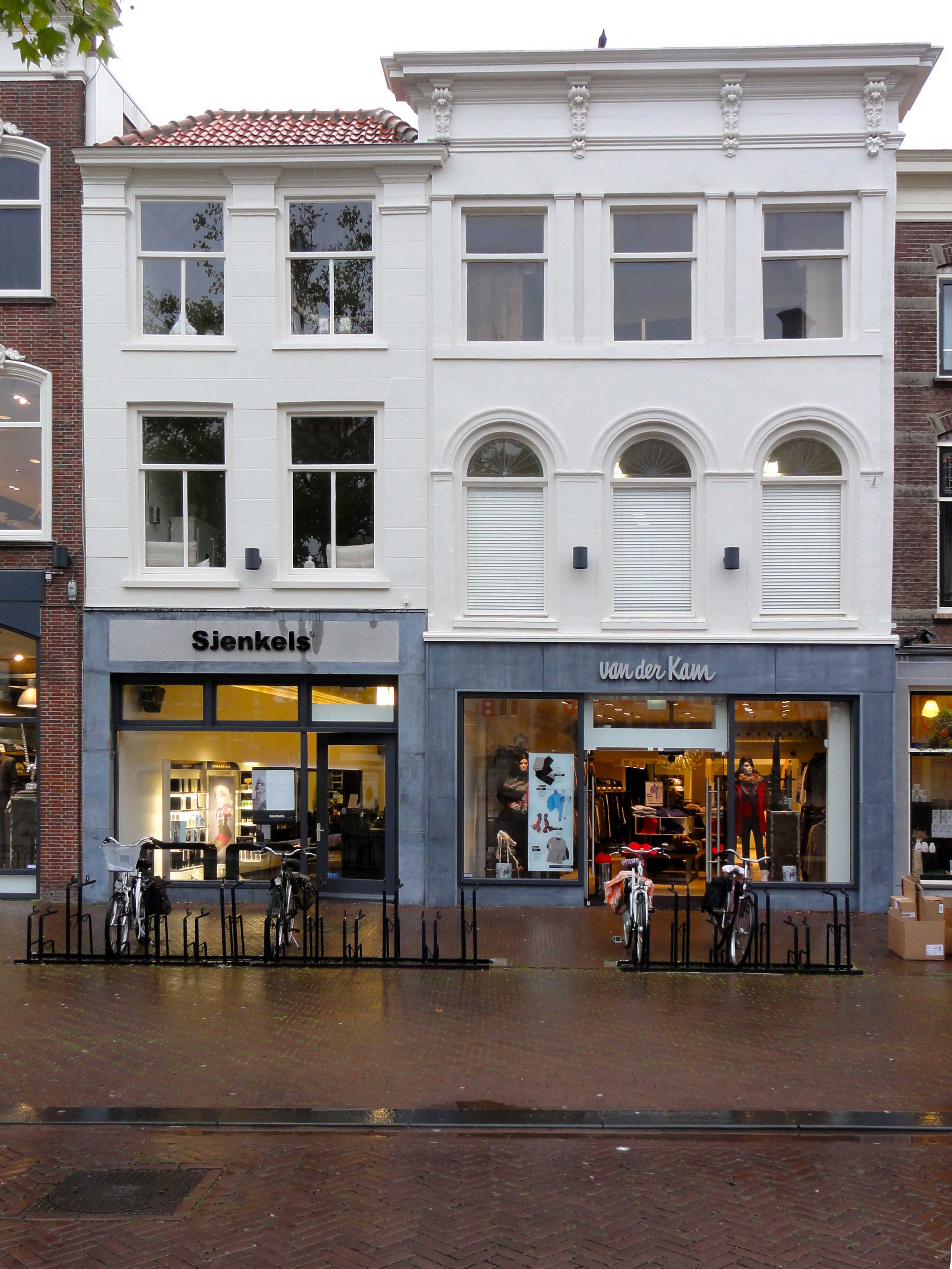 Rechts Markt 12 (het hoofdpand) en links Markt 13 (behoort bij het complex, evenals het aan de achterzijde gelegen pand Koster Gijzensteeg 6a, het vroegere magazijn van de modezaak aan de voorzijde)